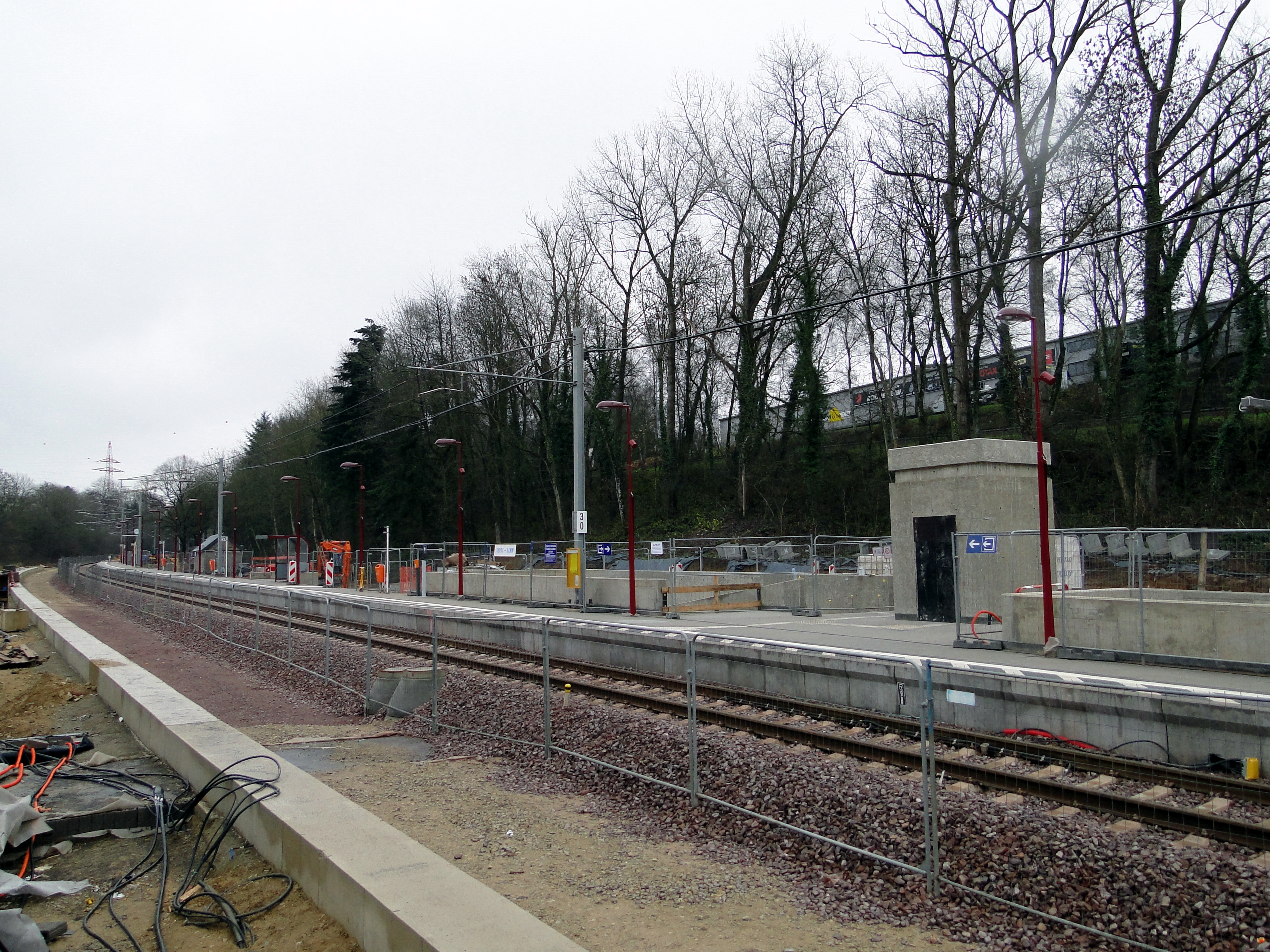 Den éischte Quai op der neier CFL Halt "Zens-Hamm" ass a Betrib.